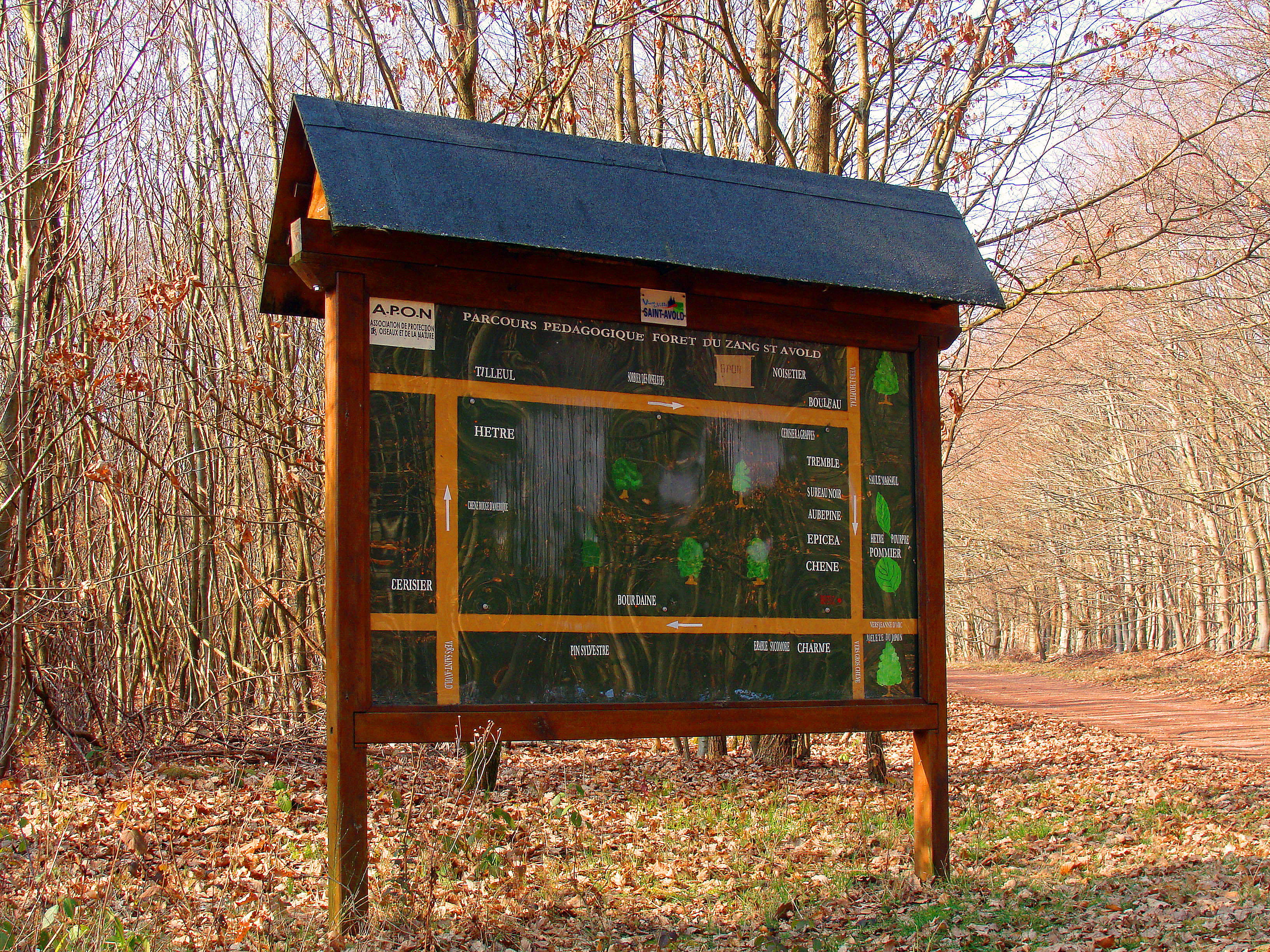 Plan de situation de l'arboretum de la forêt de Zang, communes de L'Hôpital (Moselle) et Saint-Avold. Géré par l'association APON.